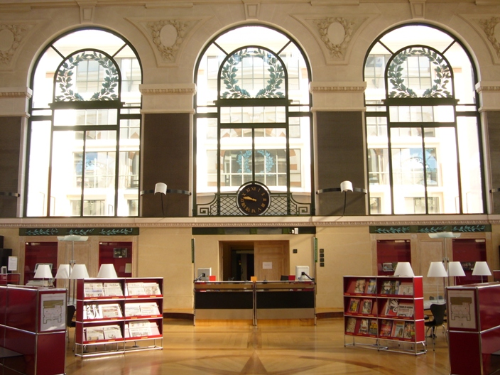 Banque de communication de la grande salle de lecture. Bibliothèque d'Etude et du Patrimoine, Toulouse.